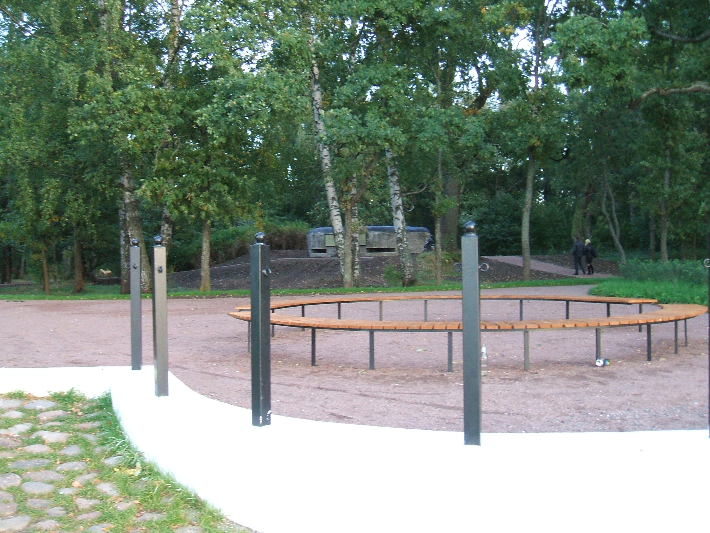 смотровая площадка на Дубковском мысе в Сестрорецке